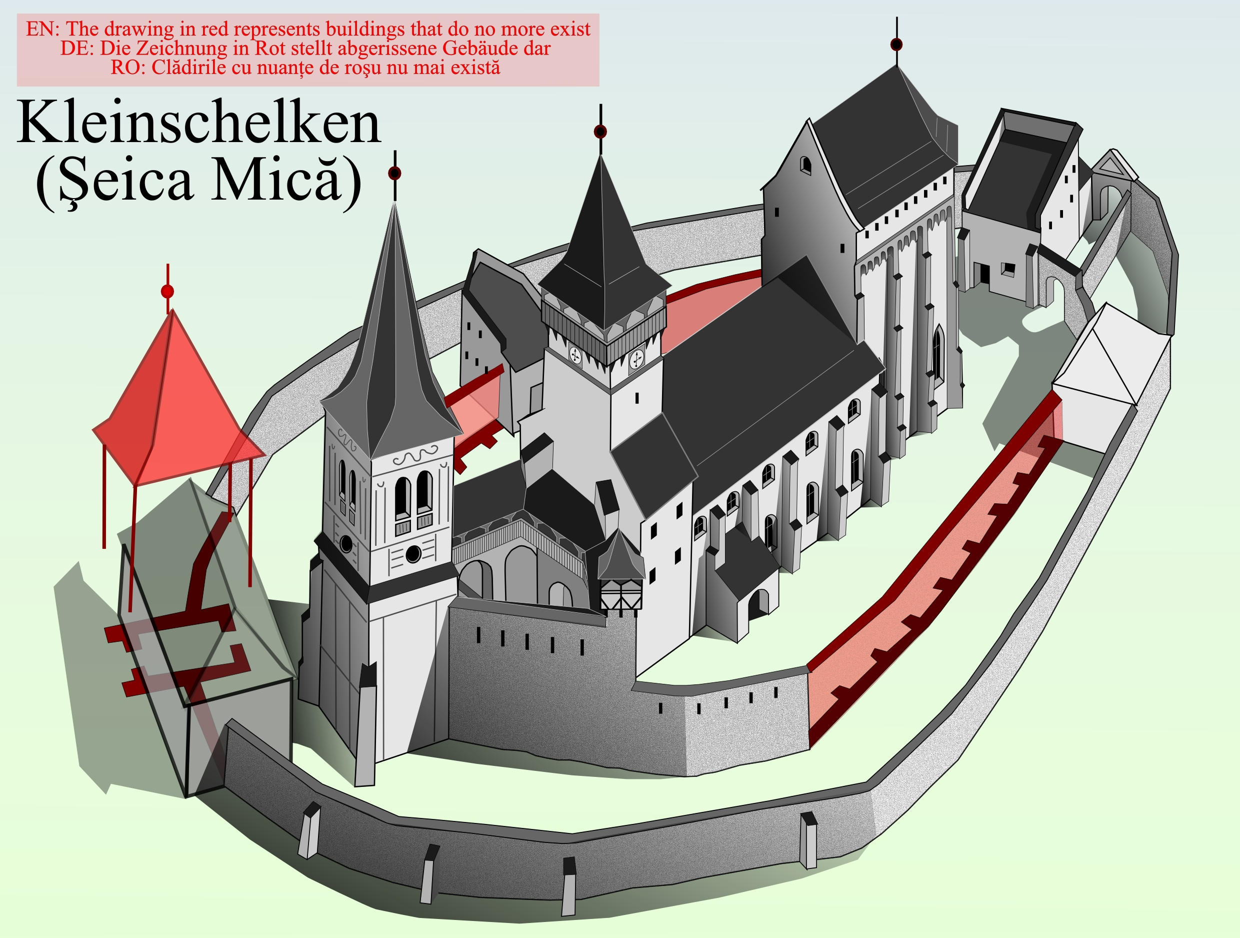 Biserica_fortificata_din_Seica_Mica.